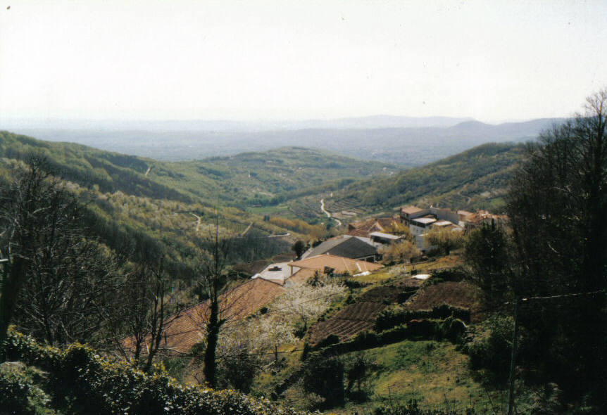 Barrado en Marzo de 2004